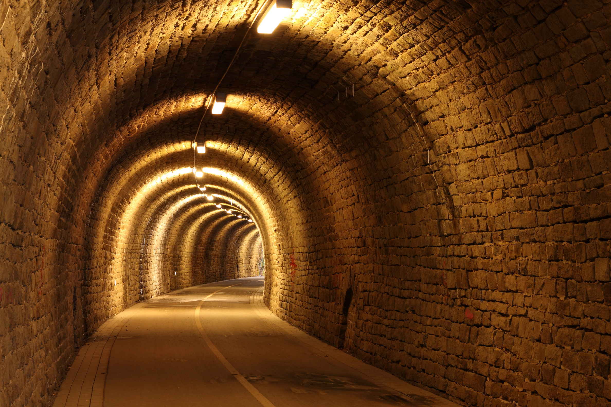 Schulenbergtunnel in Hattingen, Innenaufnahme, Blickrichtung nach Osten, Ausbauzustand für Radwegstrecke